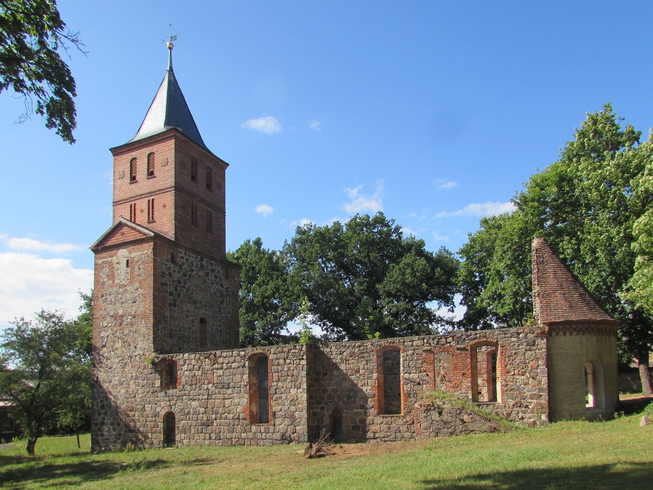 Kirchenruine Rogäsen